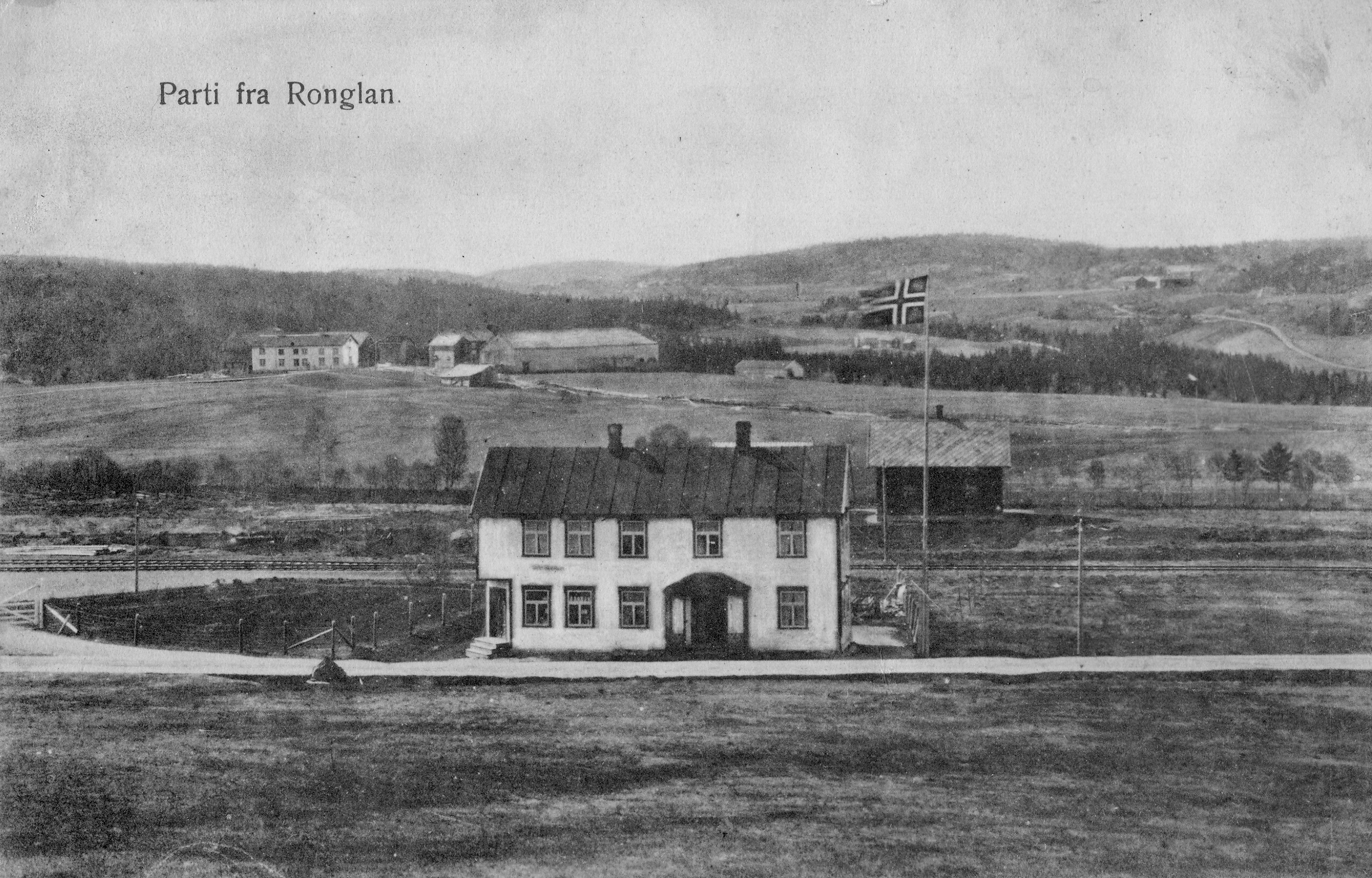 Ronglan. I forgrunnen John Dahlings handelssted. Bak flaggstanga en vokterbolig som tilhørte jernbanen. De to gårdene Ronglan ligger fortsatt samlet på høgdedraget der Ronglan østre ligger i dag (2010). Ronglan vestre flyttet til ny tomt kort tid etter at bildet ble tatt. Fotograf / Photographer: Fotoeier / Photo owner: Karl Ove Lynum Digitalisering / Digitizing: Arne Langås Foto-ID / Photo ID: 028-0007 Hvis bildet gjengis i andre sammenhenger, oppgi Åsen Museum og Historielag, fotoeier og fotograf som kildereferanse. Har du utfyllende opplysninger? Legg gjerne igjen en kommentar nedenfor eller send e-post til . | If you re-use this photo, please refer to Åsen Museum og Historielag, the photographer and the owner of the photo. Do you have additional information? Please leave a comment or send an e-mail to .